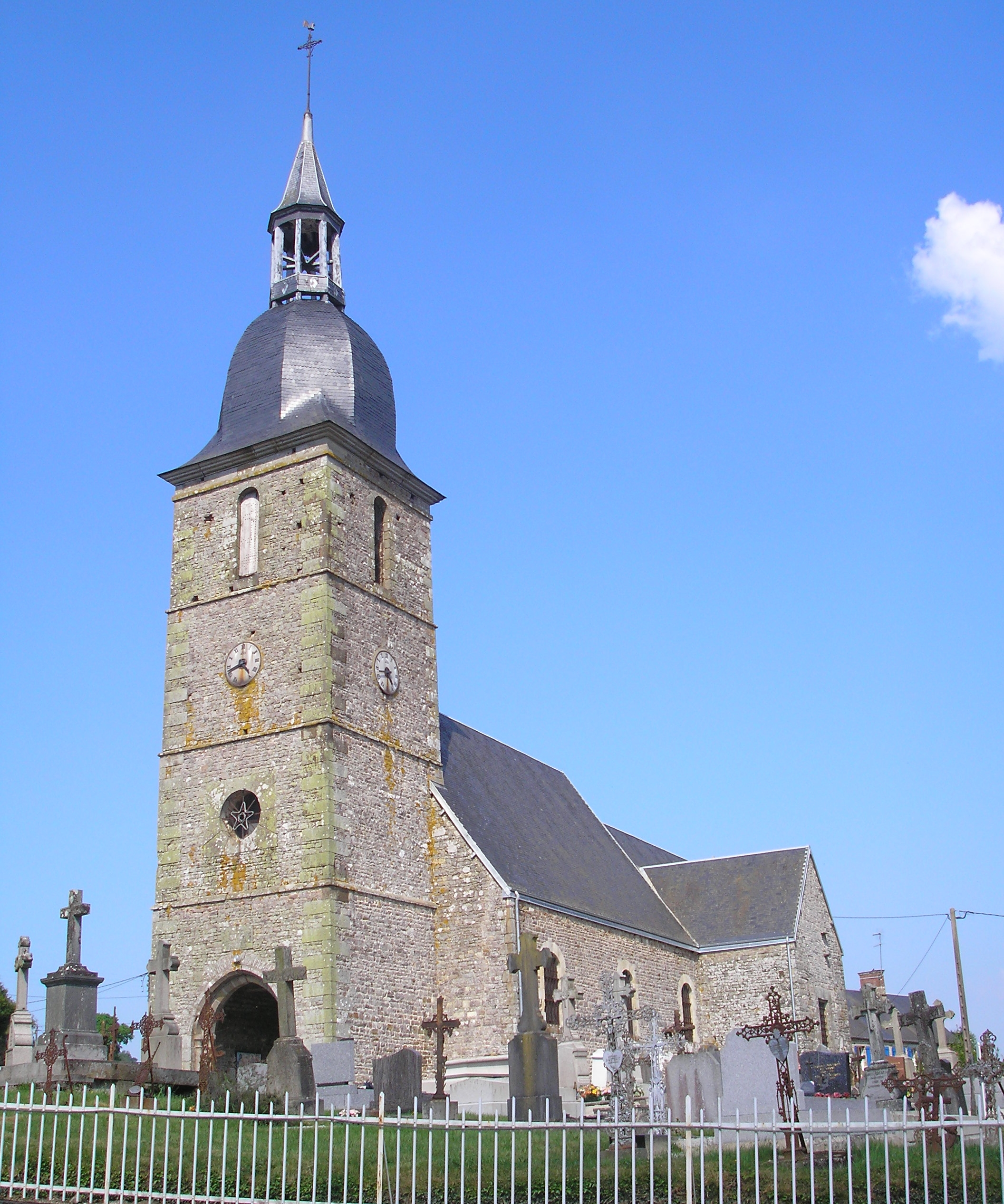 Lassy (Normandie, France). L'église Saint-Rémy.